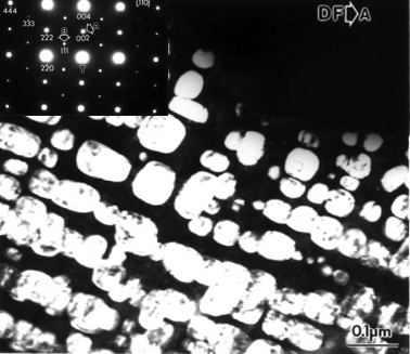 تصویر 2